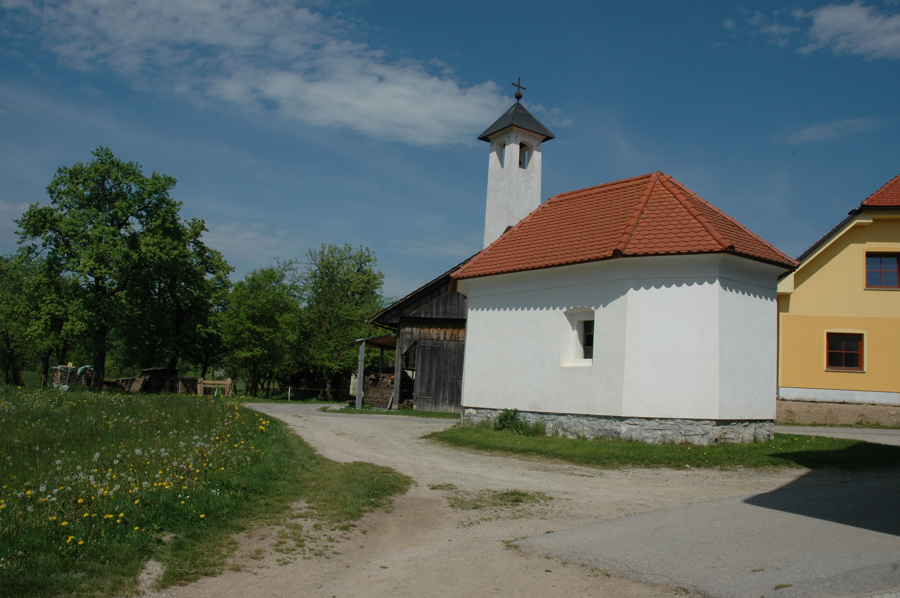 Dane, village in Slovenia